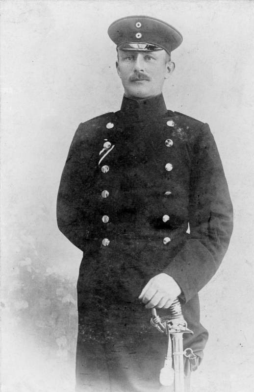 Paul Emil von Lettow-Vorbeck Hauptmann, 1ter Adjutant, des kaiserlichen Oberkommandos, der Schutztruppe für Deutsch Süd West Afrika.